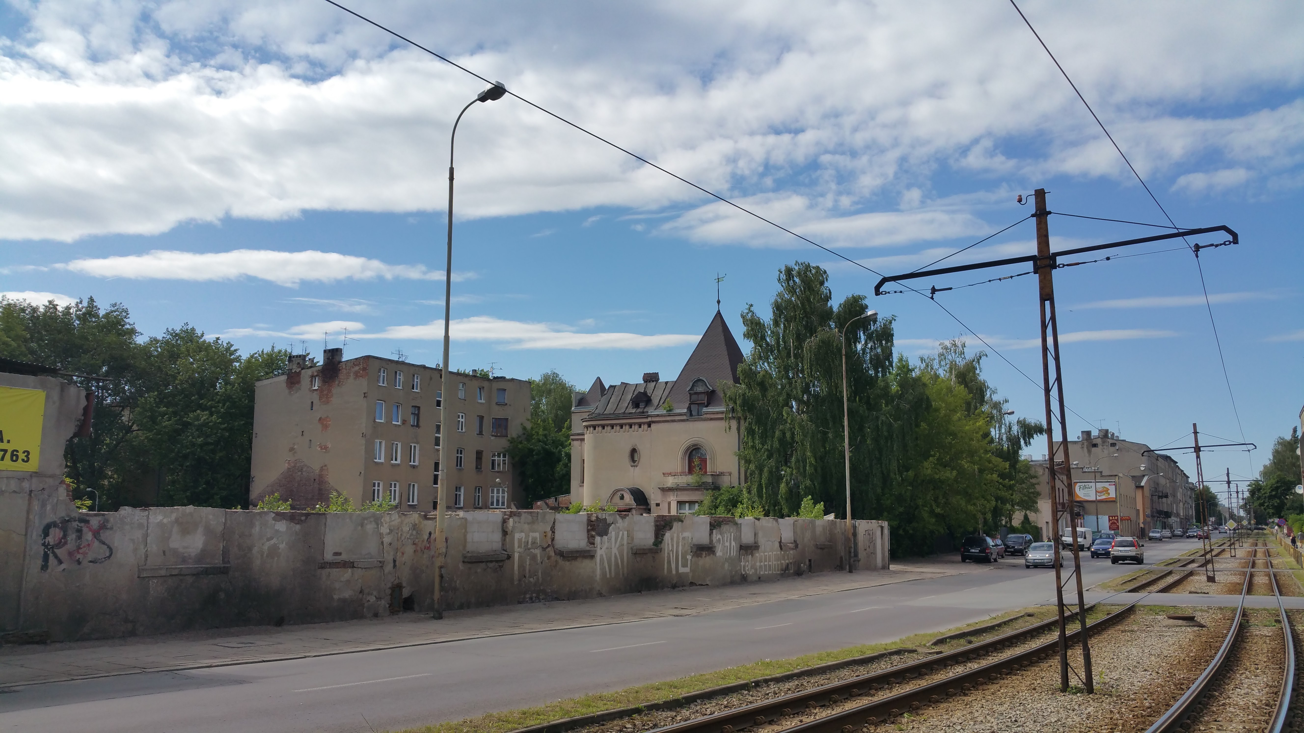 Willa łódzkiego fabrykanta, Jakuba Rafała Meissnera przy ulicy Kilińskiego nr 243 w Łodzi. Data budowy: 1926-1928 rok.